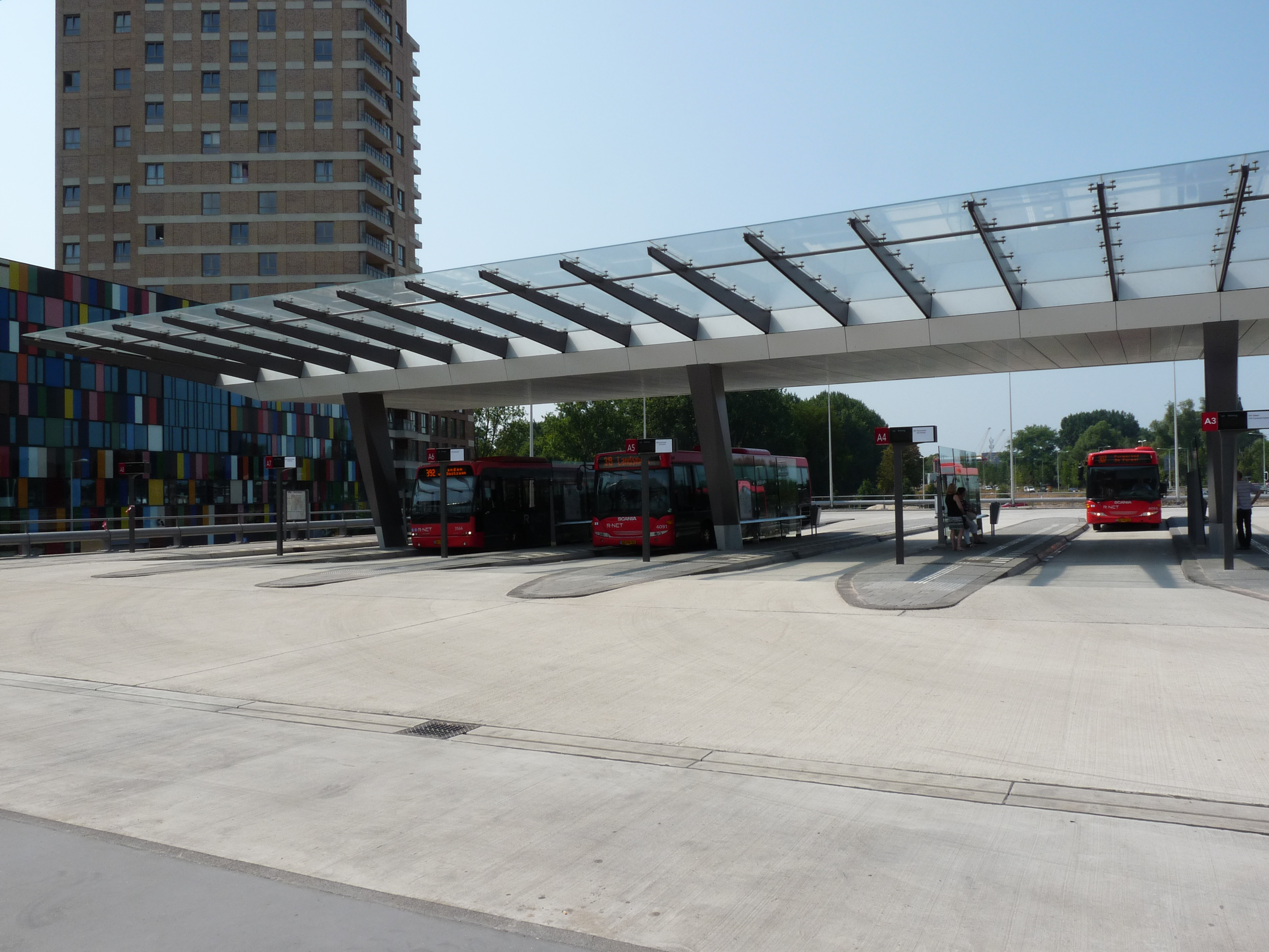 Het nieuwe metrostation Amsterdam Noord